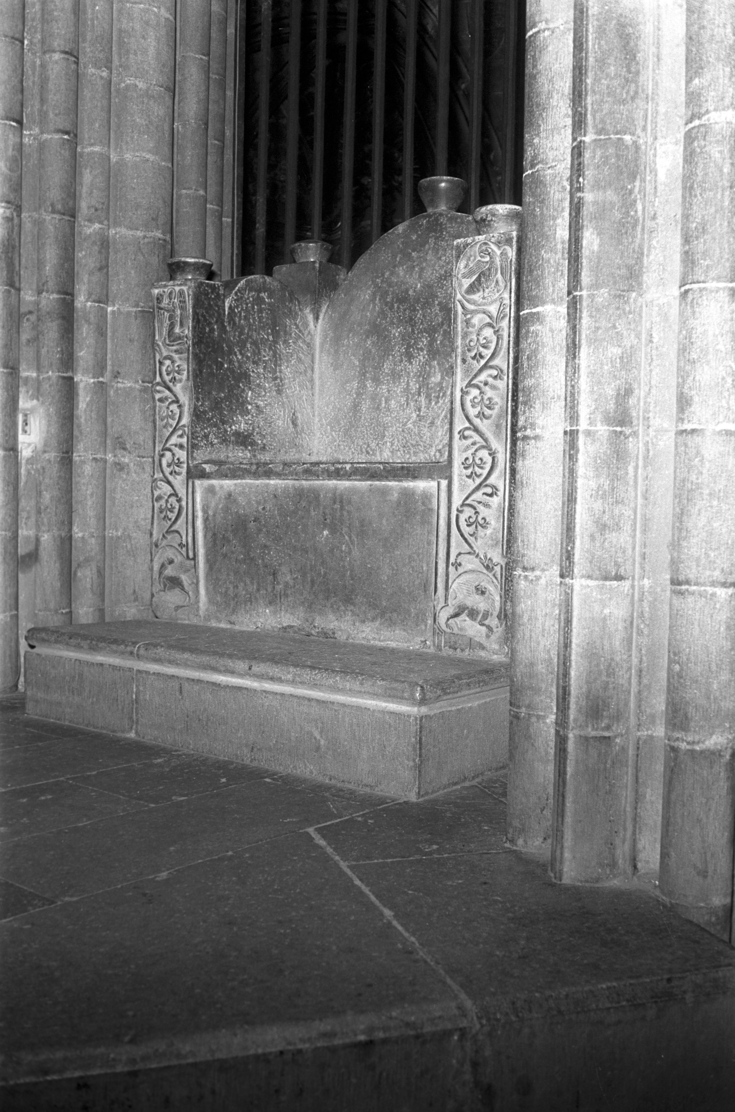 Cadira original de Carlemany. Autoria de la fotografia: Narcís Sans Prats Catedral de Girona